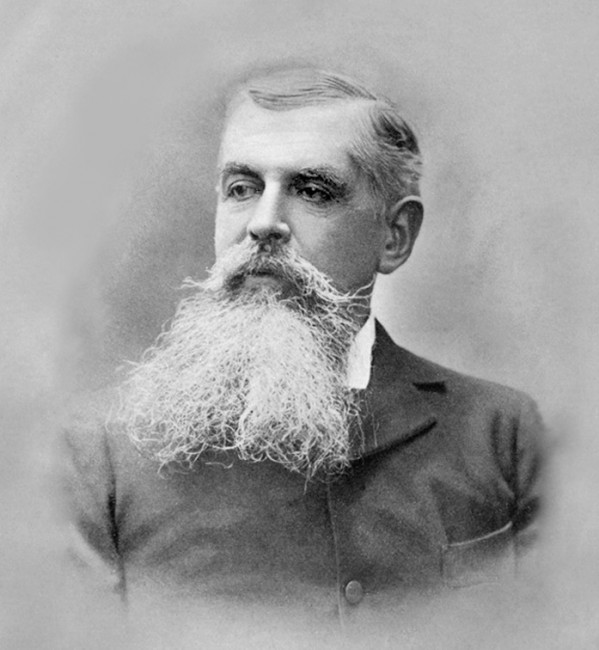 Семён Васильевич Лепёшкин (1852–1913) — русский общественный деятель, меценат, почётный член Московского университета.